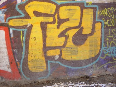 Graffiti a Moszkva téren (Budapest)